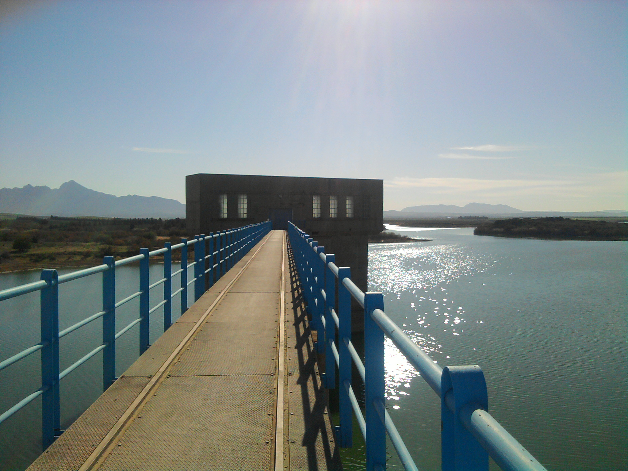 Tunisie, vue sur le lac de retenue du barrage de Bir Mcherga (Djebel Oust)